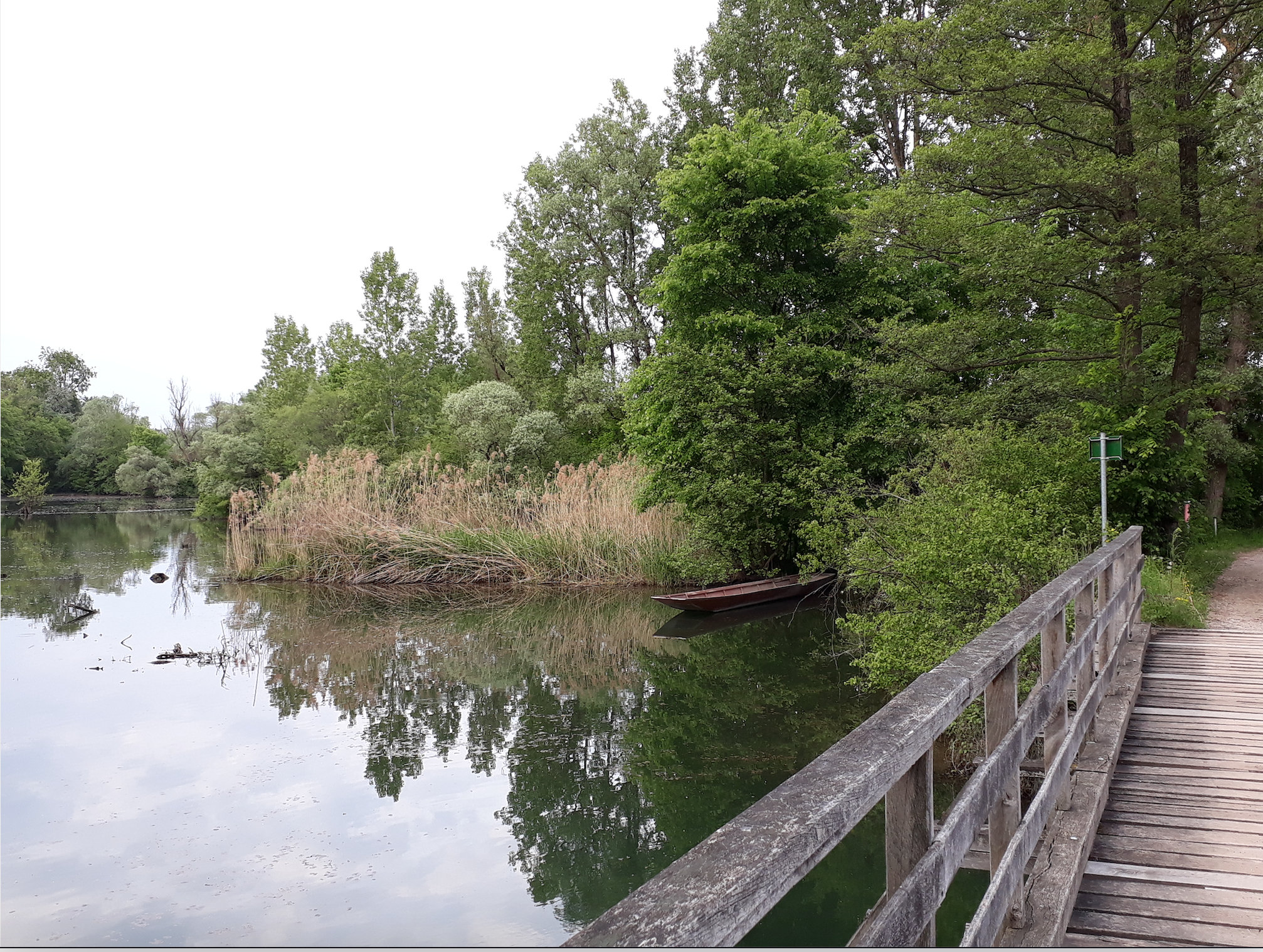 cette partie de la commune française de Rhinau est administrée par l'Allemagne